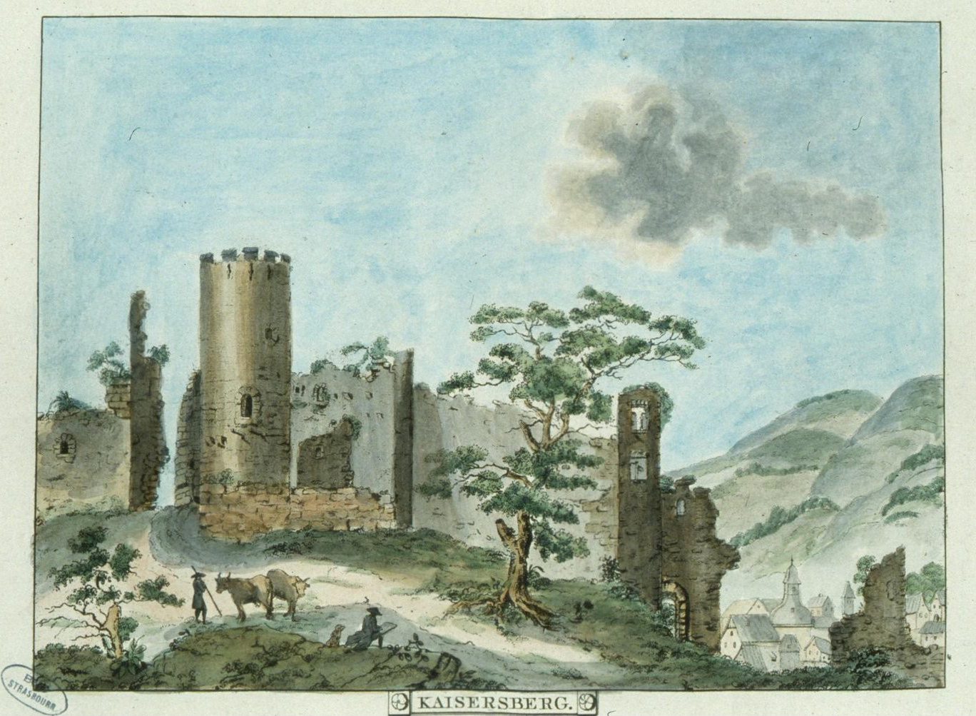 Ansicht der elsässischen Burgruine Kaysersberg